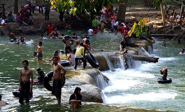 นักท่องเที่ยวที่น้ำตกเจ็ดสาวน้อย